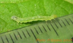 Ctenoplusia limbirena-juvenile caterpillar